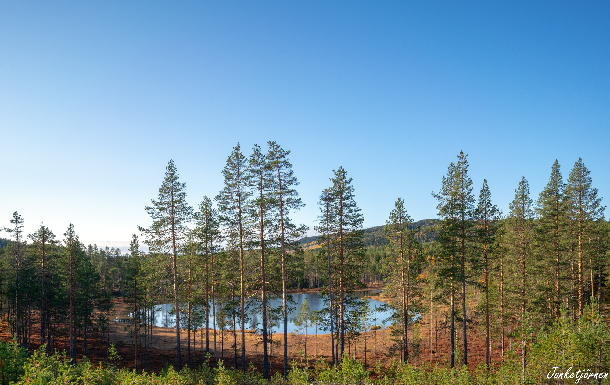 Jonketjärnen söder om Locksta. Vy från norra sidan.